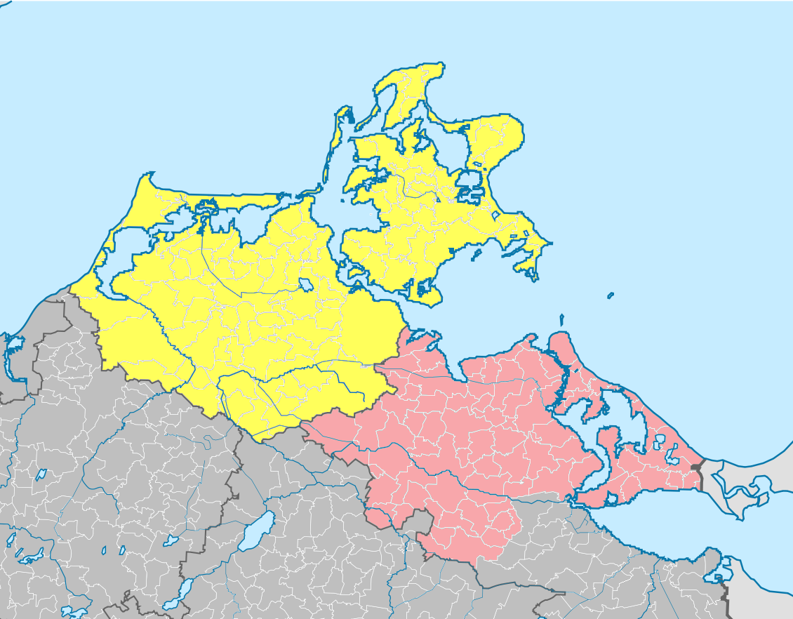 Karte der Amtsgerichtsbezirke im Landgerichtsbezirk Stralsund nach Umsetzung der Gerichtsstrukturreform zum 27. Februar 2017 Amtsgericht Stralsund Amtsgericht Greifswald